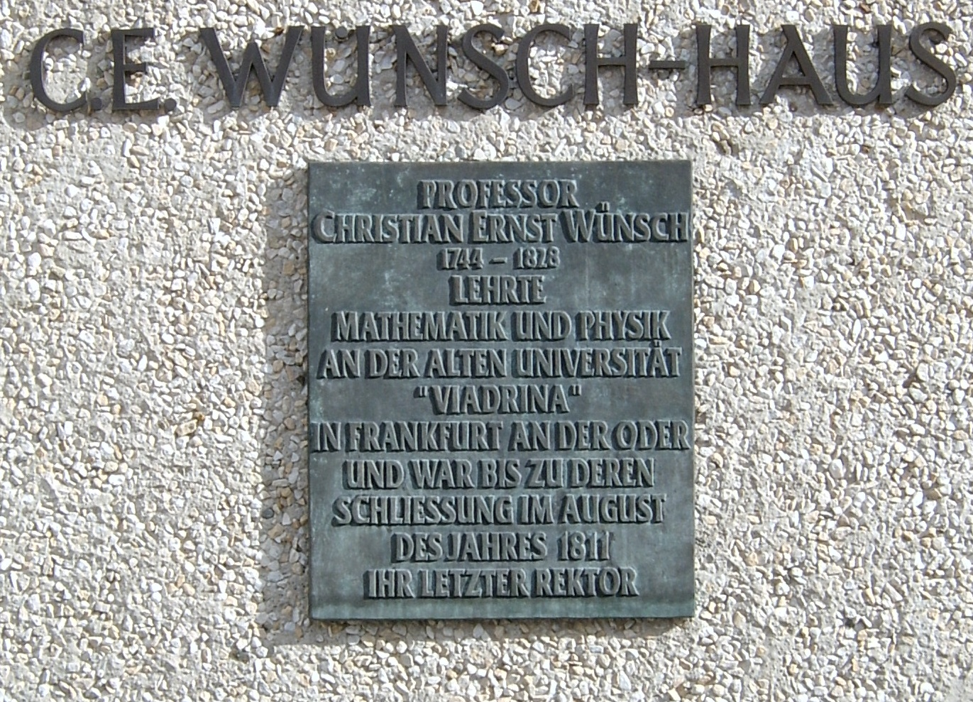 Schild an einem Haus in Frankfurt (Oder) im Studentendorf Mühlenweg. Erinnert wird an den letzten Rektor bis zur Schließung 1811 Christian Ernst Wünsch (1744-1828)